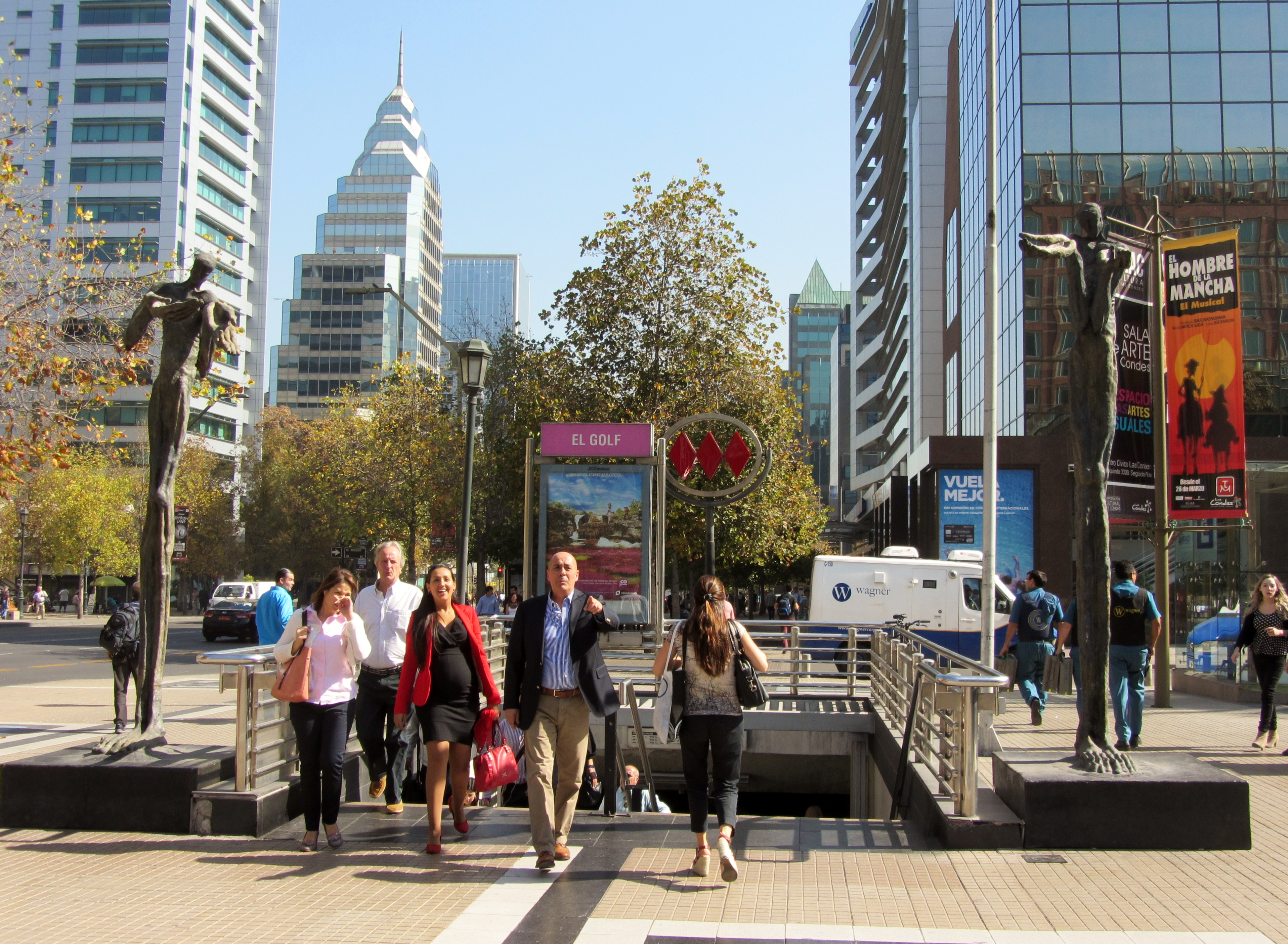 Par de esculturas de la chilena Pilar Landerretche en el acceso norte al metro El Golf, Las Condes, Santiago de Chile.